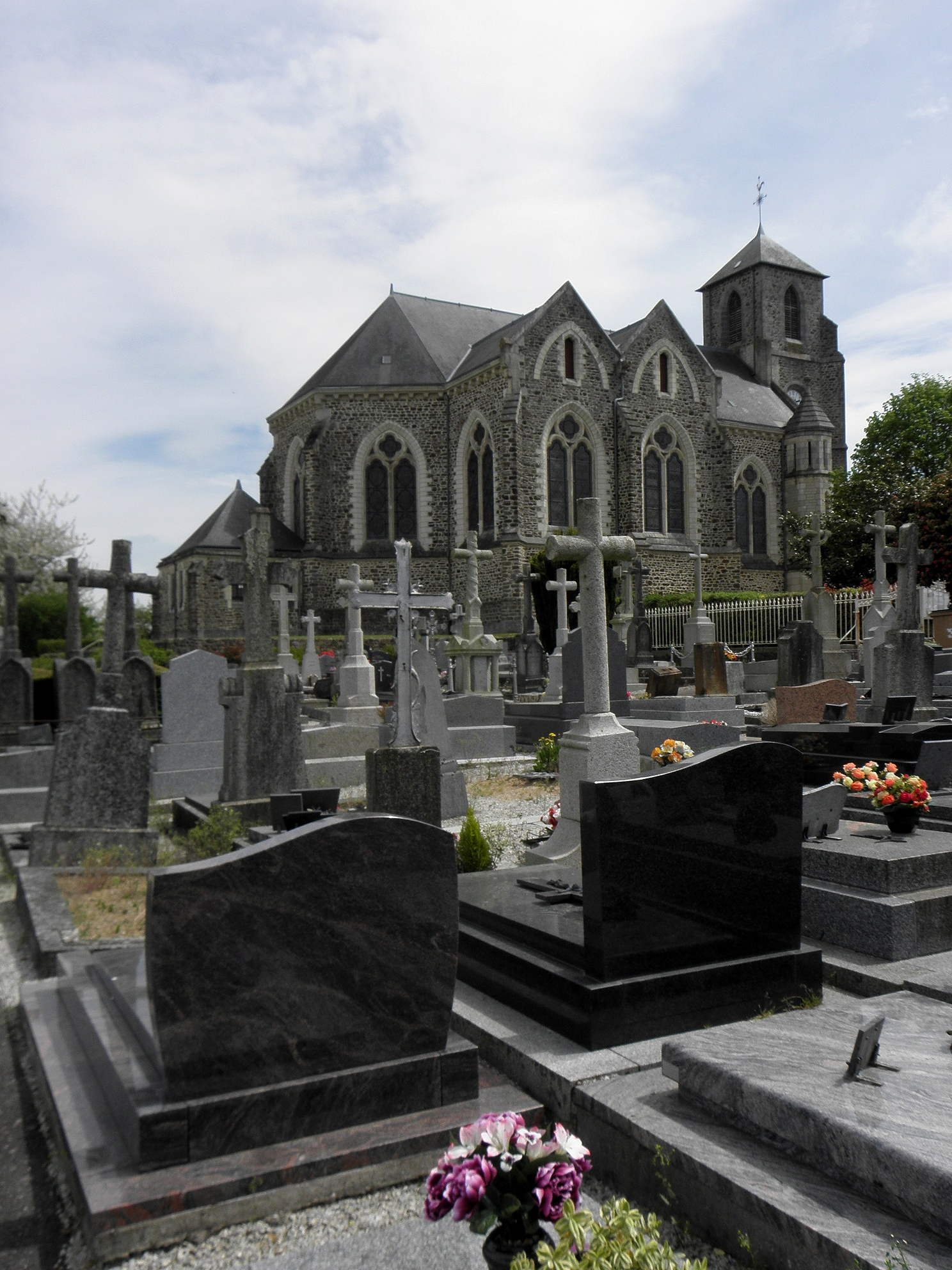 Église saint-Martin de Laignelet (35). Chevet et flanc ouest.